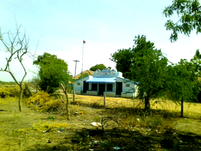 இது ஒரு கிராமத்தின் தலைமை கட்டடம்